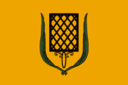 Flag of San Lawrenz, Malta